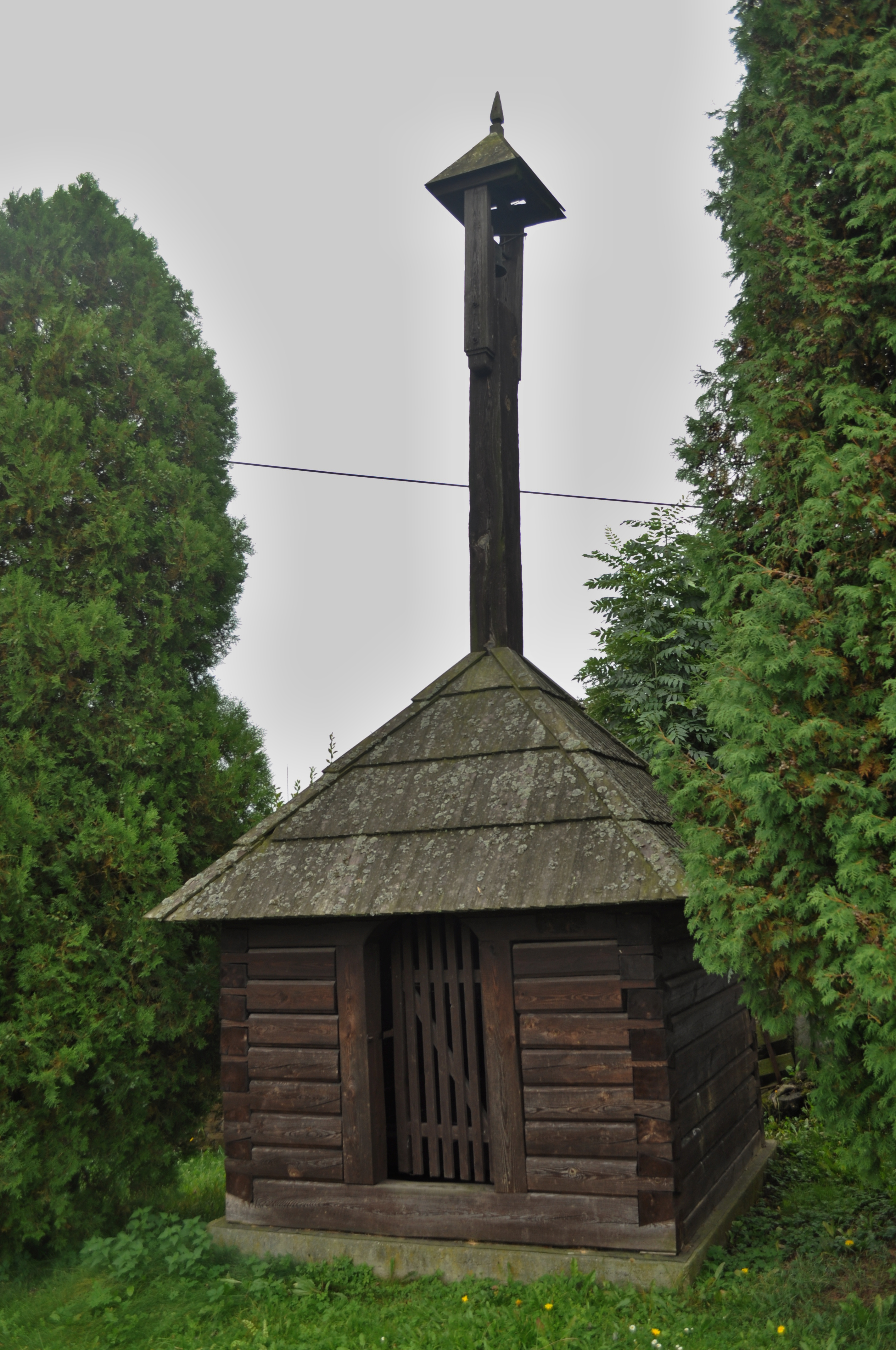 Zvonice, náves, Robčice (Kozojedy).